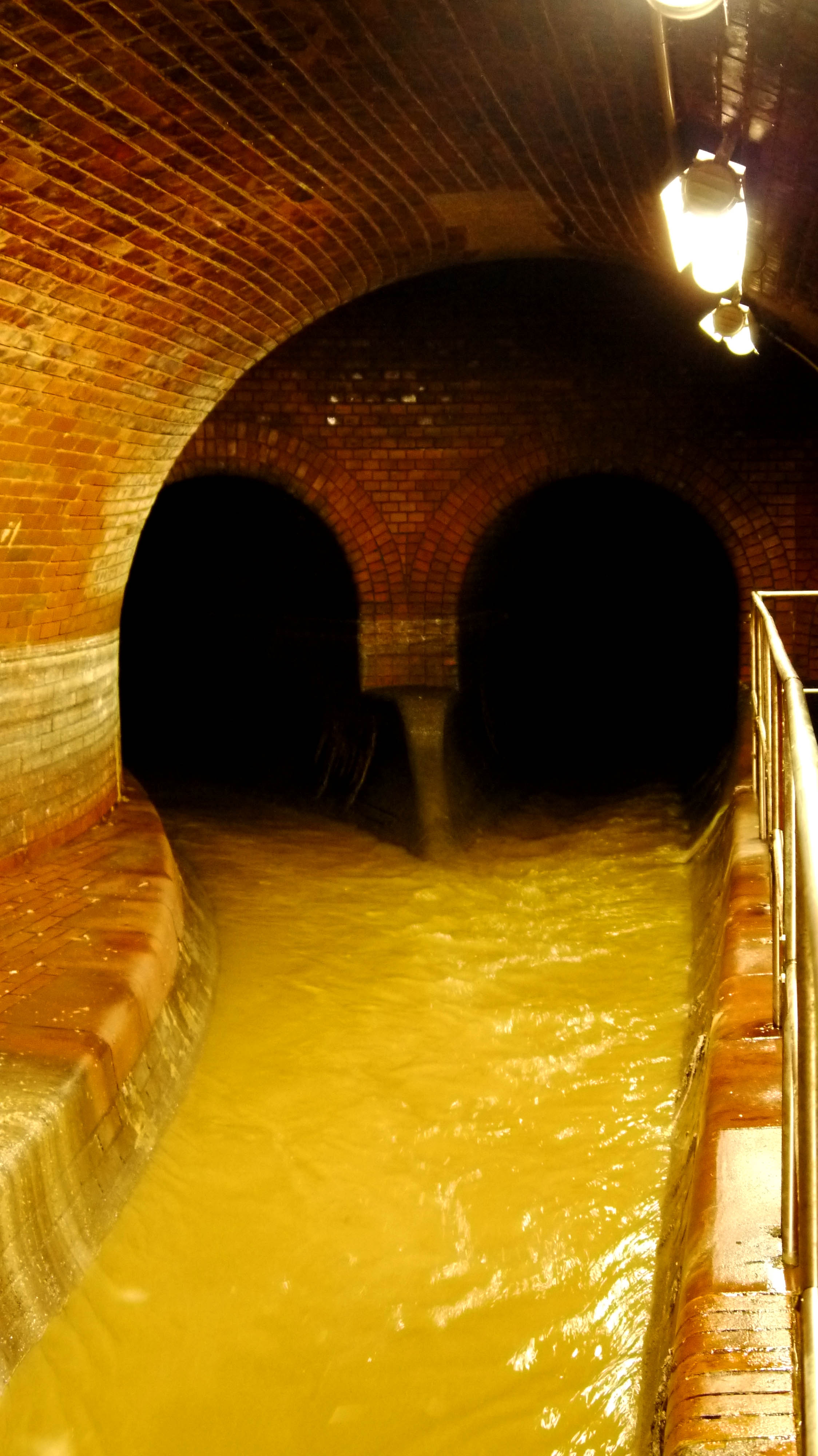 Kanalisation in München